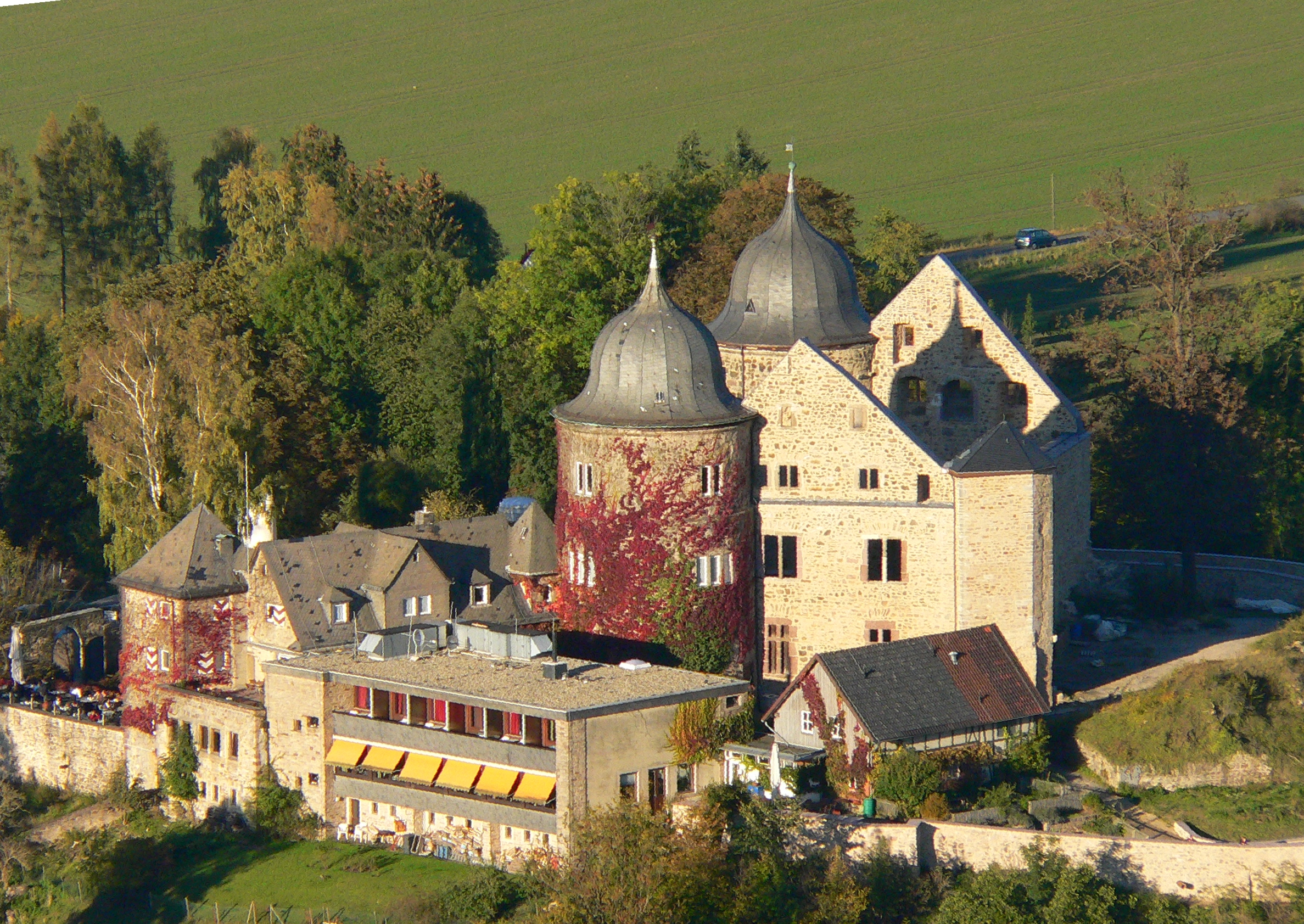 Südwestansicht der Sababurg im Reinhardswald, Hessen, Deutschland. Aufnahme aus einem Heißluftballon.